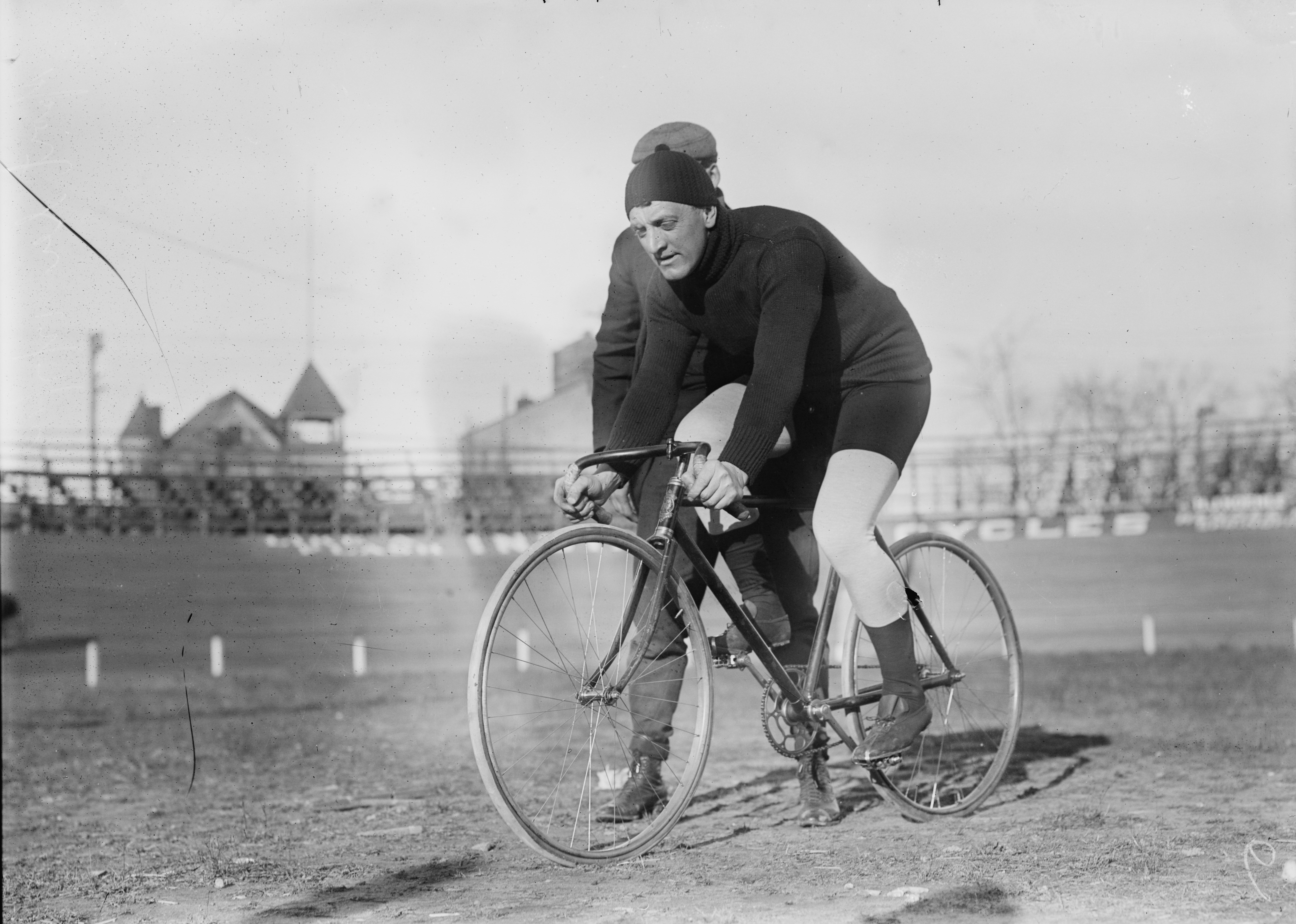 Walter Rütt, German track racer